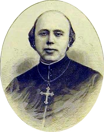 Gravure de Mgr Guillaume-Marie-Romain Sourrieu évêque de Chalons puis archevêque de Rouen